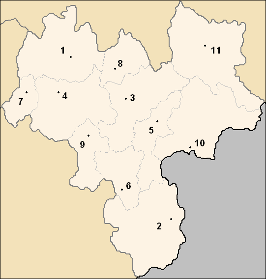 Sujet : carte des obchtini (municipalités) de l'oblast de Khaskovo, en Bulgarie Auteurs : (Любомир Таушанов = Lyoubomir Taouchanov), pour la version originale en bulgare, , pour l'adaptation française (repères chiffrés) Source : (7 mai 2005) Licence